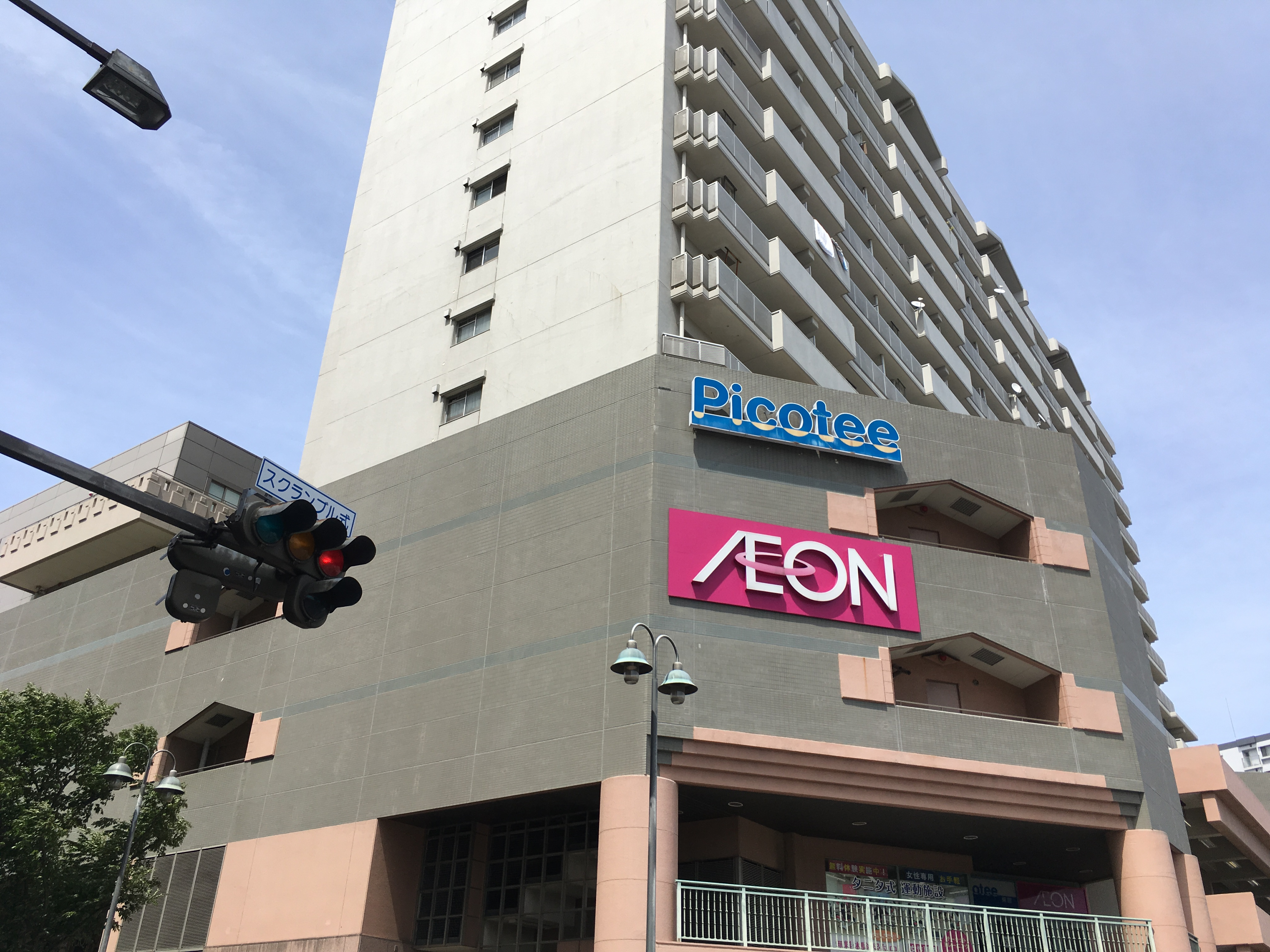 松戸市北小金 ピコティー西館